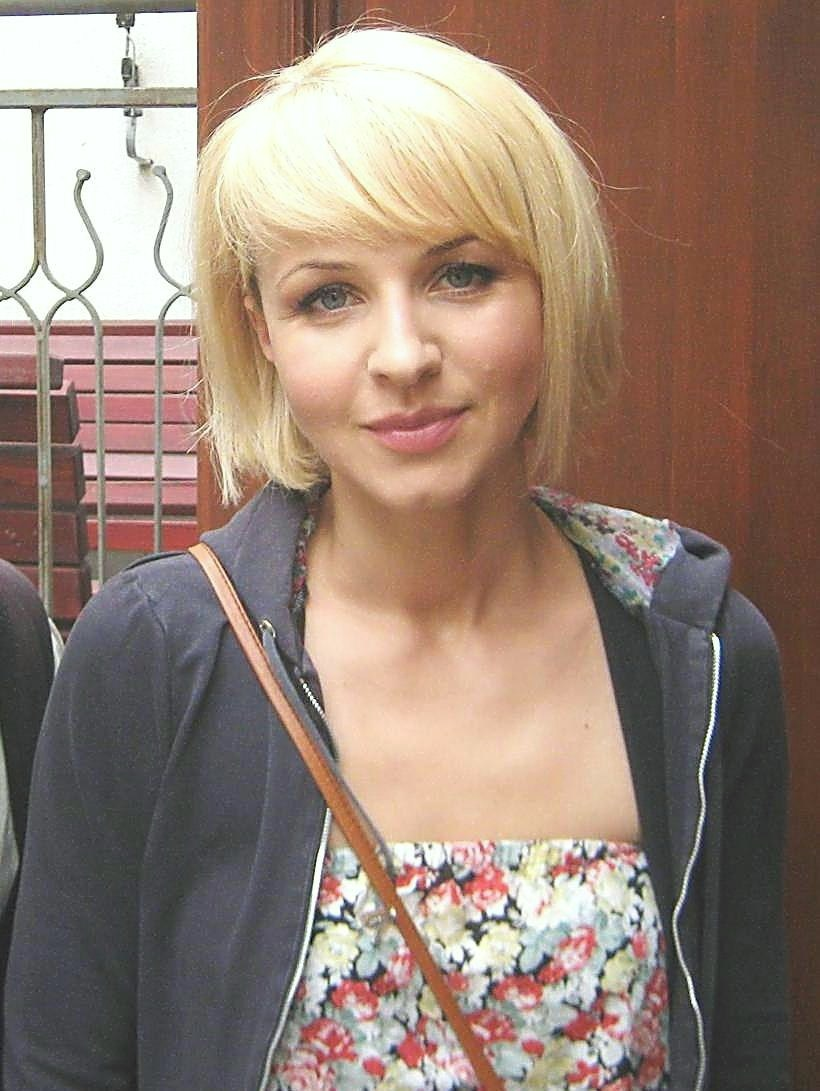 Monika Dryl.